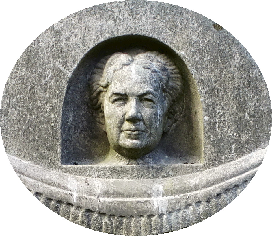 Sofia Cumaelius gravsten på Norra begravningsplatsen